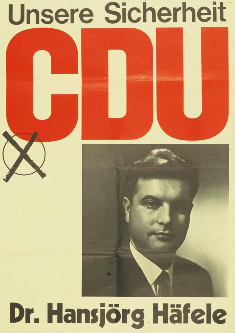 Unsere Sicherheit CDU Dr. Hansjörg Häfele Abbildung: Porträtfoto - Stimmkreuz Plakatart: Kandidaten-/Personenplakat mit Porträt Auftraggeber: CDU Bonn Drucker_Druckart_Druckort: KVD Köln Objekt-Signatur: 10-001: 1234 Bestand: Plakate zu Bundestagswahlen (10-001) GliederungBestand10-18: Plakate zu Bundestagswahlen (10-001) » Die 5. Bundestagswahl am 19. September 1965 » CDU » Mit Porträtfoto Lizenz: KAS/ACDP 10-001: 1234 CC-BY-SA 3.0 DE